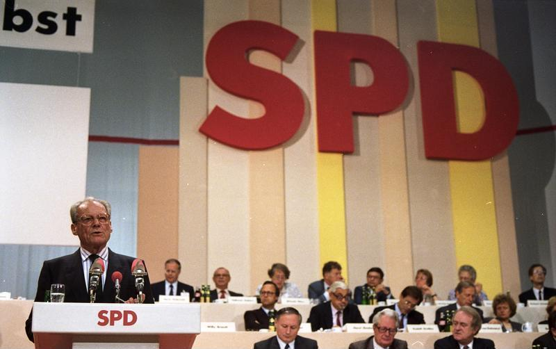 30.8.-2.9.1988 SPD-Parteitag in Münster, Halle Münsterland